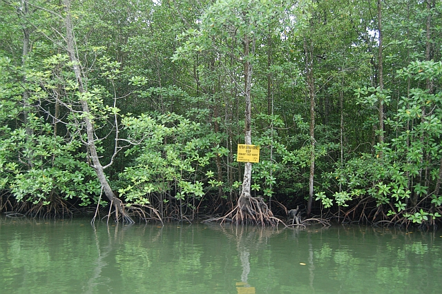 Hutan Simpan Kisap